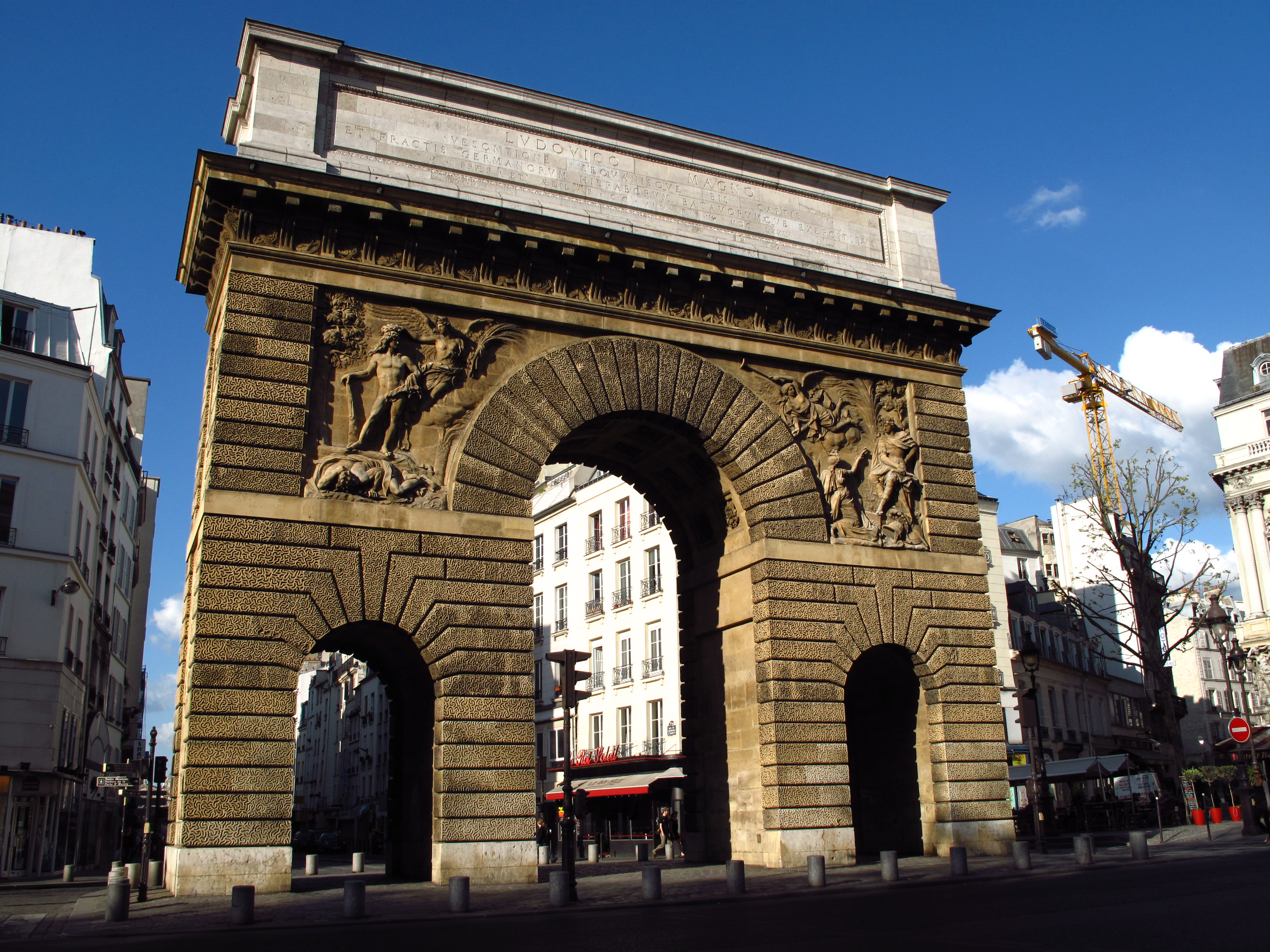 Façade sud de la Porte Saint-Martin.